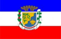 Bandeira de Guaraçaí